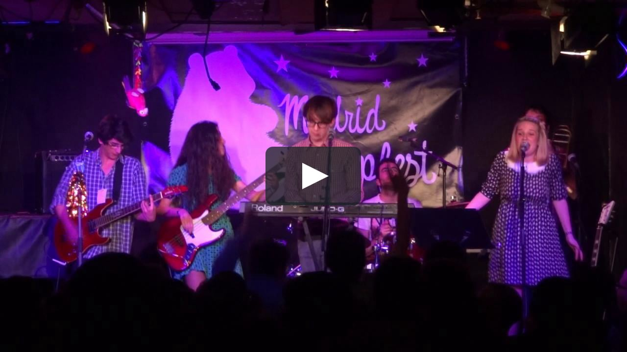 Papa Topo en el Madrid Popfest de 2013